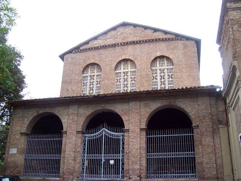 Roma - Chiesa di S. Balbina